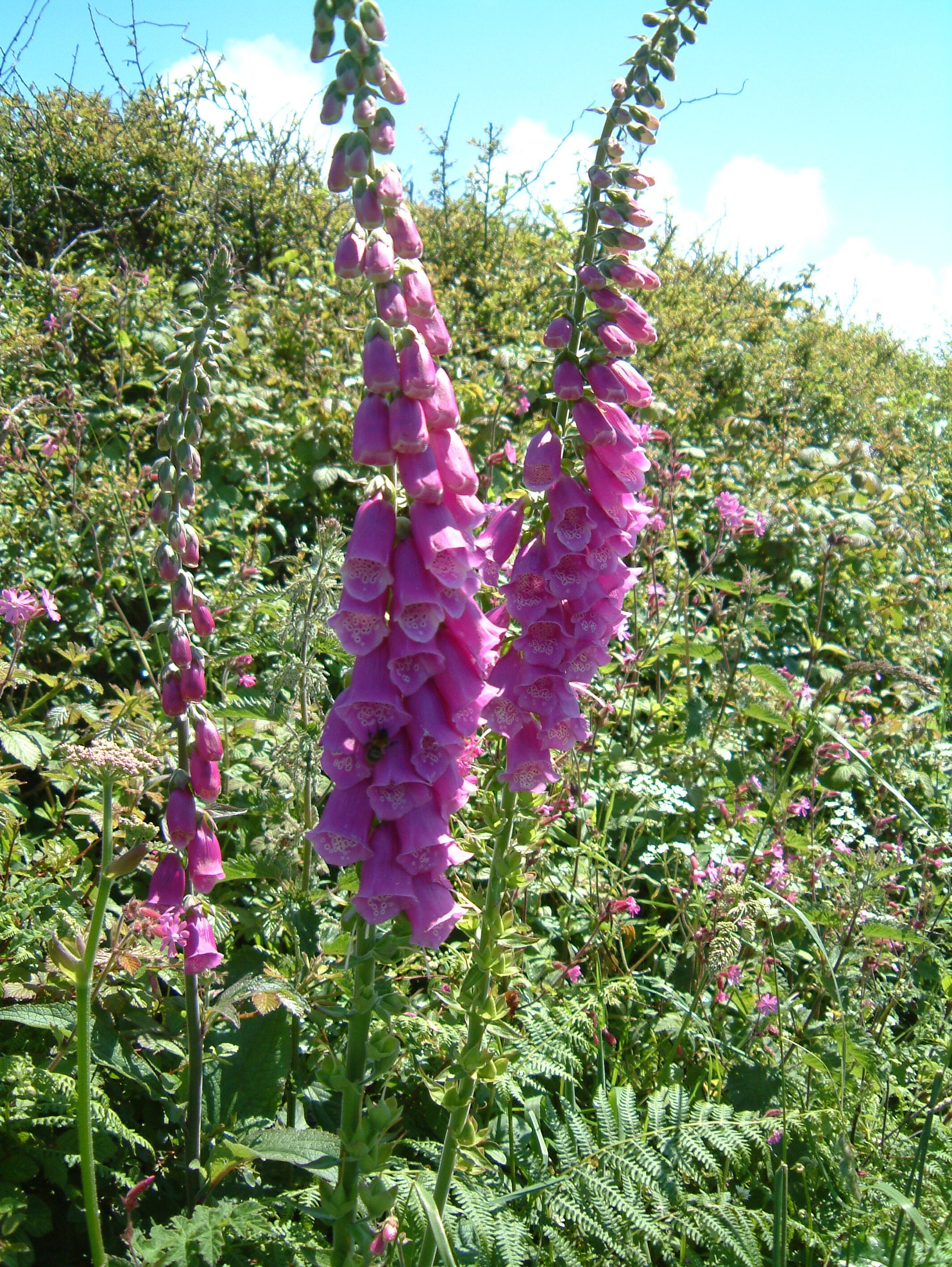 Foxglove (Digitalis purpurea)